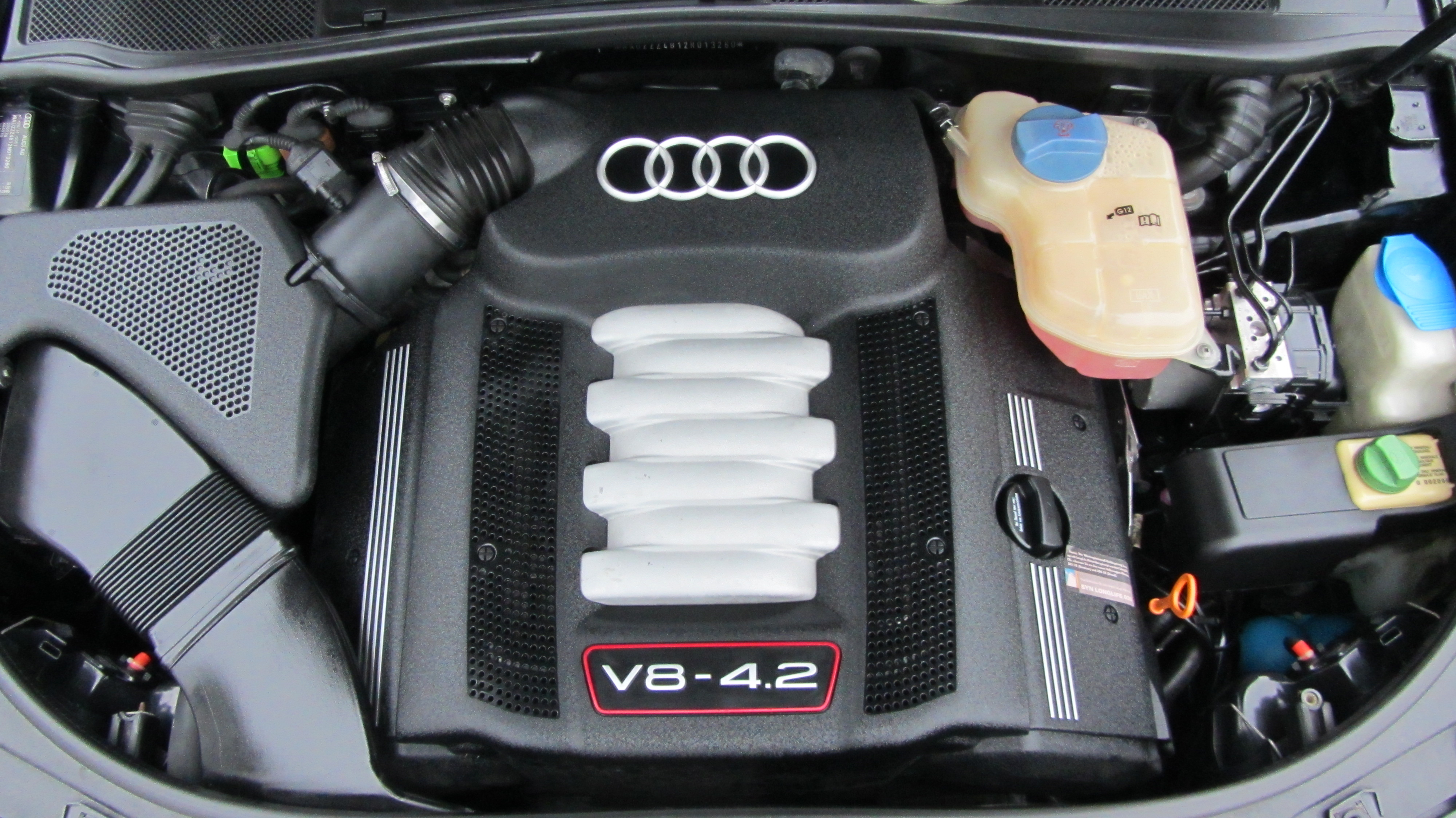 Audi S6 C5 V8 4.2 Motorraum